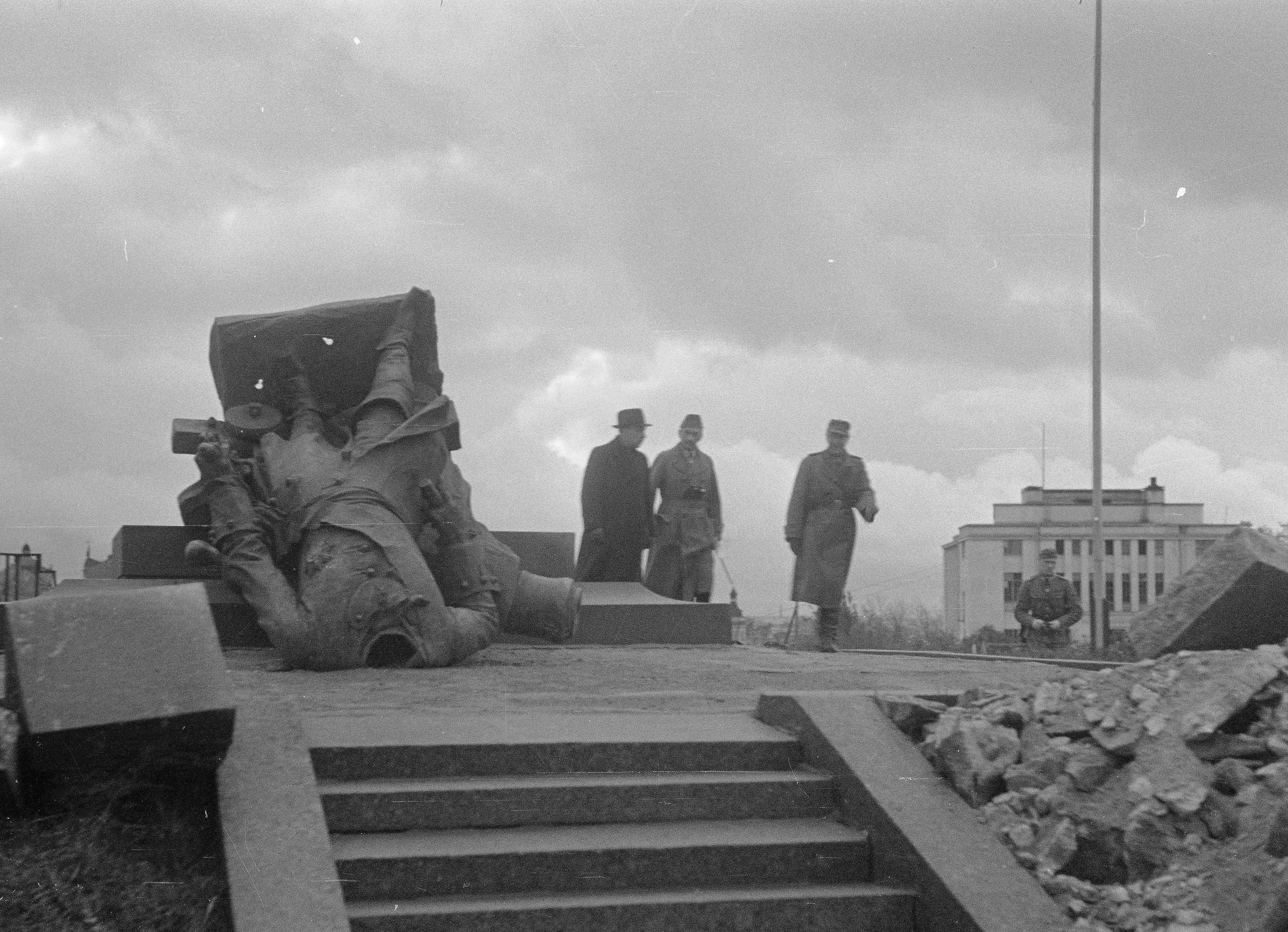 У памятника Петру Первому